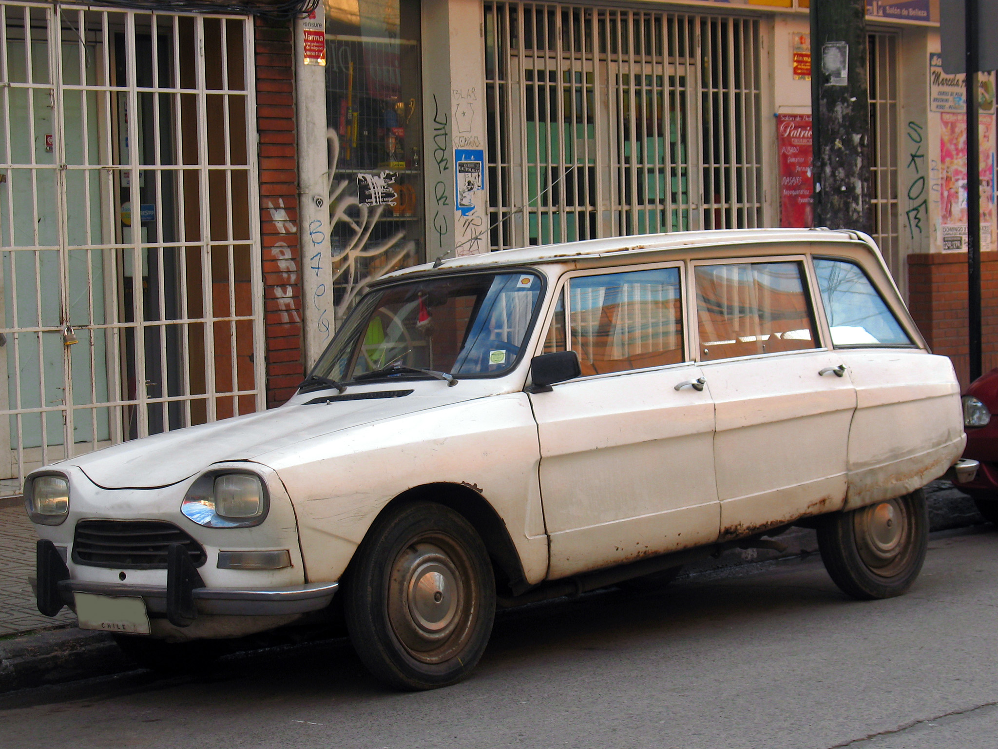 Citroen Ami 8 1979